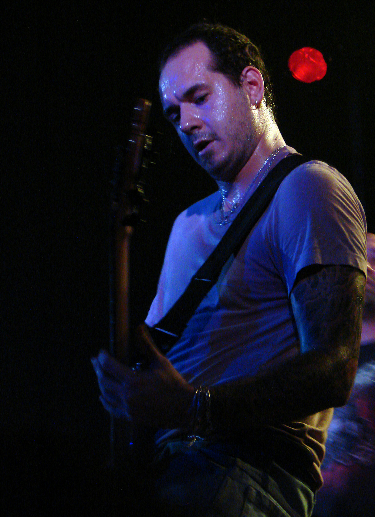 Benighted au Coolness'tival 2007, le 3/11/07 à Montdidier (60). Eric à la basse.